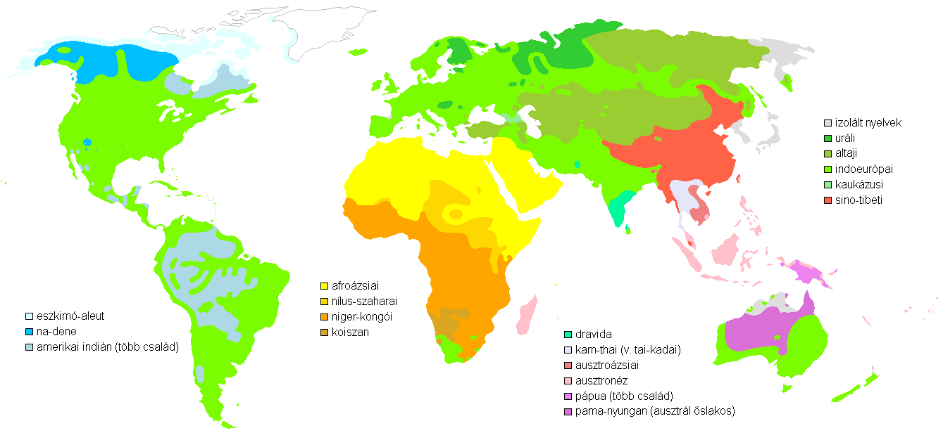 A térkép a legnagyobb, még vitán felül álló nyelvi nyelvcsaládokat és nyelvtörzseket mutatja (a japánt és a koreait ennek alapján például izolált nyelvekként jeleníti meg, szemben egyes vitatott elméletekkel, amelyek más nyelvcsaládokhoz vagy egymáshoz kötik őket.) A színek a WikiProject Languages színeit tükrözik. A jelmagyarázatban megadott nyelvcsaládok – az angol változattól eltérően – nem egy blokkban, hanem tájegységek szerint bontva, nagyjából északról dél felé haladó sorrendben, az eredetinél nagyobb betűmérettel szerepelnek.